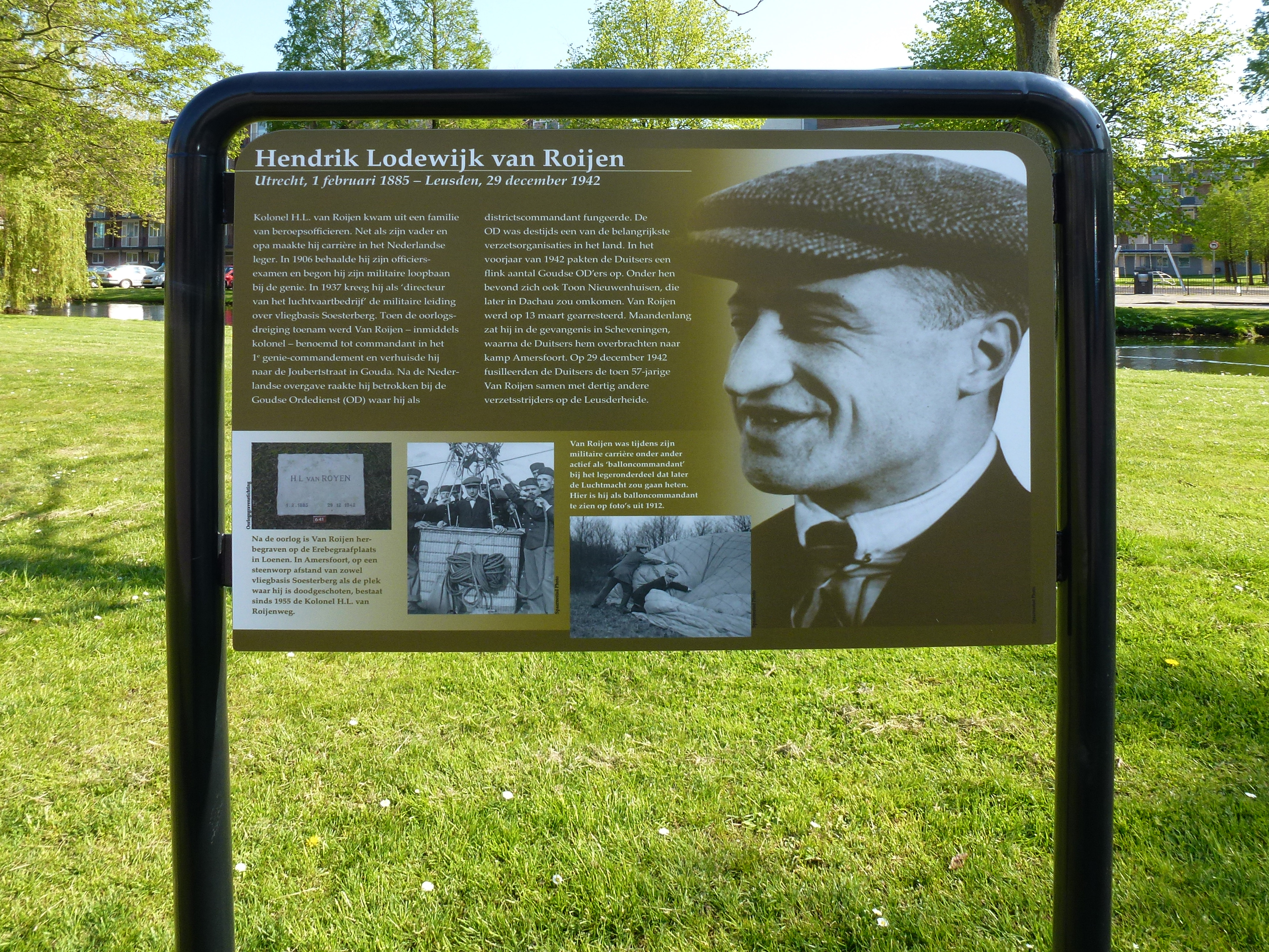 Verzetsheld Hendrik Lodewijk van Royen. Op 10 april 2014 zijn in Oosterwei 10 van in totaal 16 borden met informatie over verzetsstrijders onthuld. In Oosterwei, een wijk in Gouda, zijn na de 2e wereldoorlog, de wederopbouw, 16 straten vernoemd naar verzetsstrijders. Veel bewoners van deze straten wisten maar weinig over de verzetshelden waarnaar de straten vernoemd zijn. Zij en anderen hebben er voor gezorgd dat nu in iedere straat een informatiebord staat, zodat de gedachtenis aan deze strijders levend blijft. (De overige 6 borden zijn in april 2018 geplaatst)